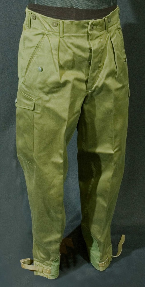 Fältbyxor m/1959 Identifikationsnr: AM.093020 Samling: Armémuseum